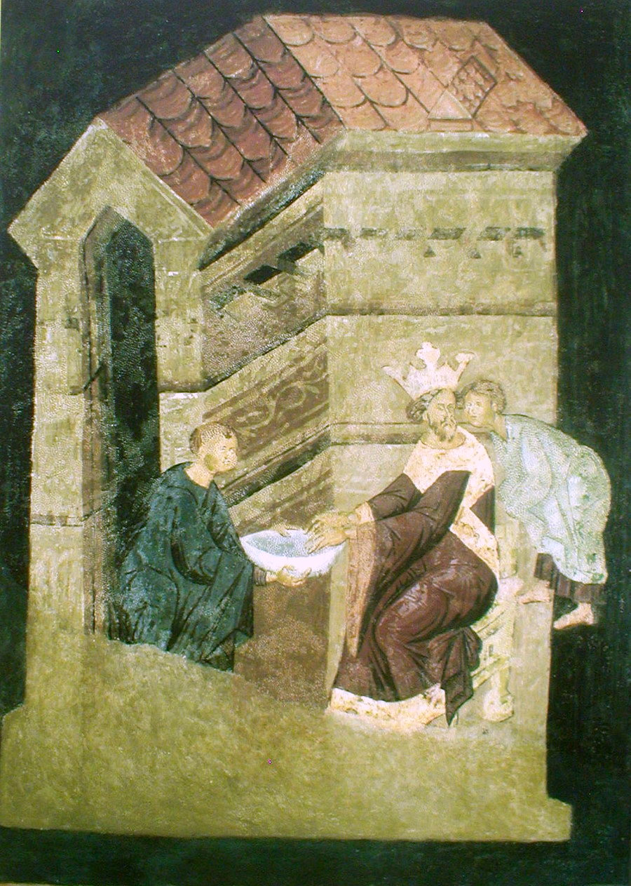 Фрэска ў замкавай капліцы ў Любліне